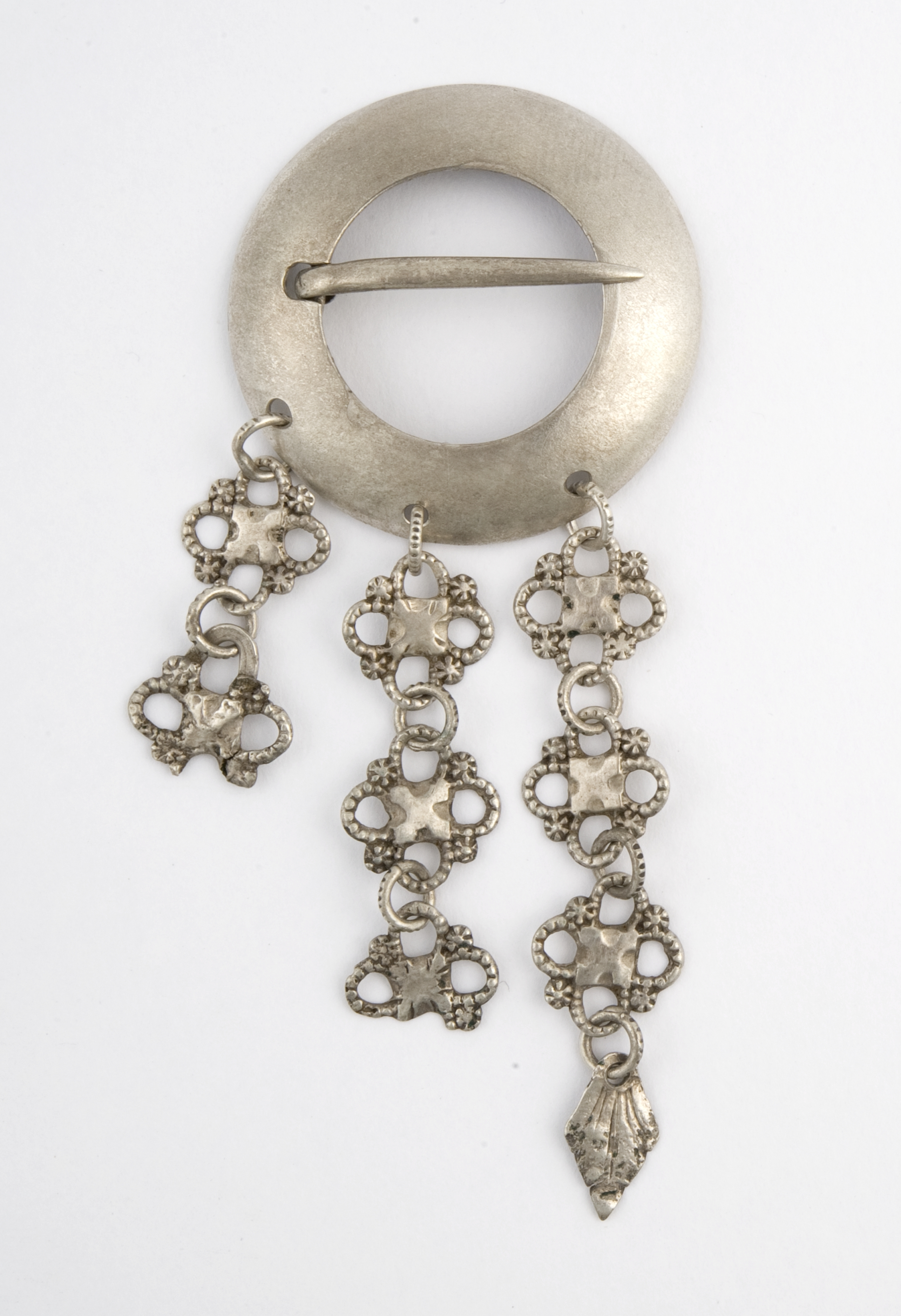 Bursring i sølv innkjøp av Nordiska museet i 1883 i Midtre Gauldal i Sør-Trøndelag. Foto Anne-Lise Reinsfelt / Norsk Folkemuseum, NF.1993-0969.